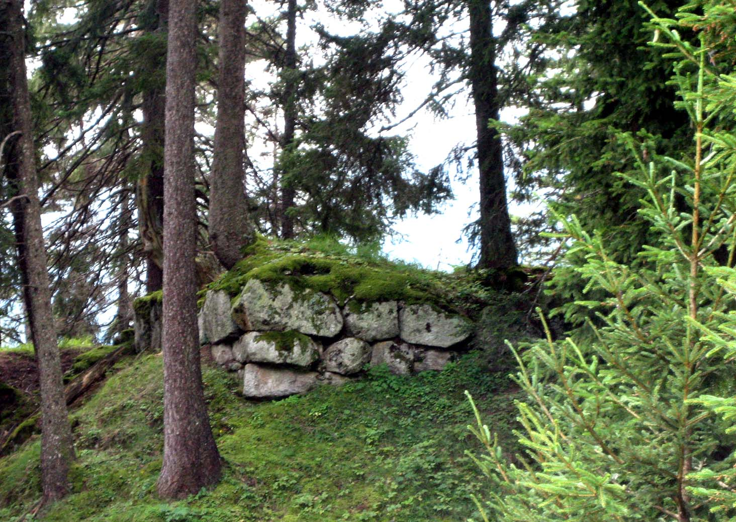 Turmecke